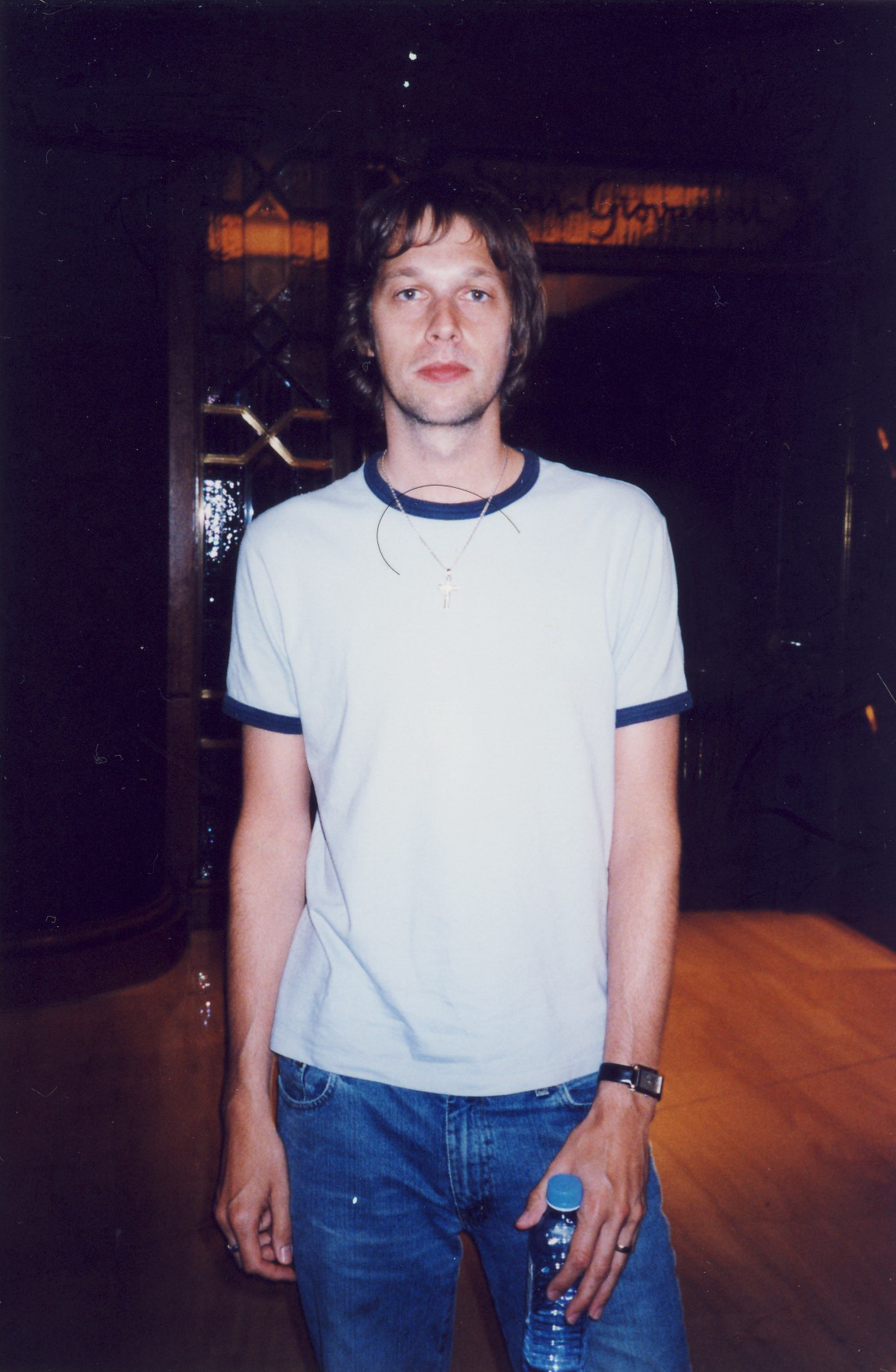 Andy Bell in Bangkok, Thailand